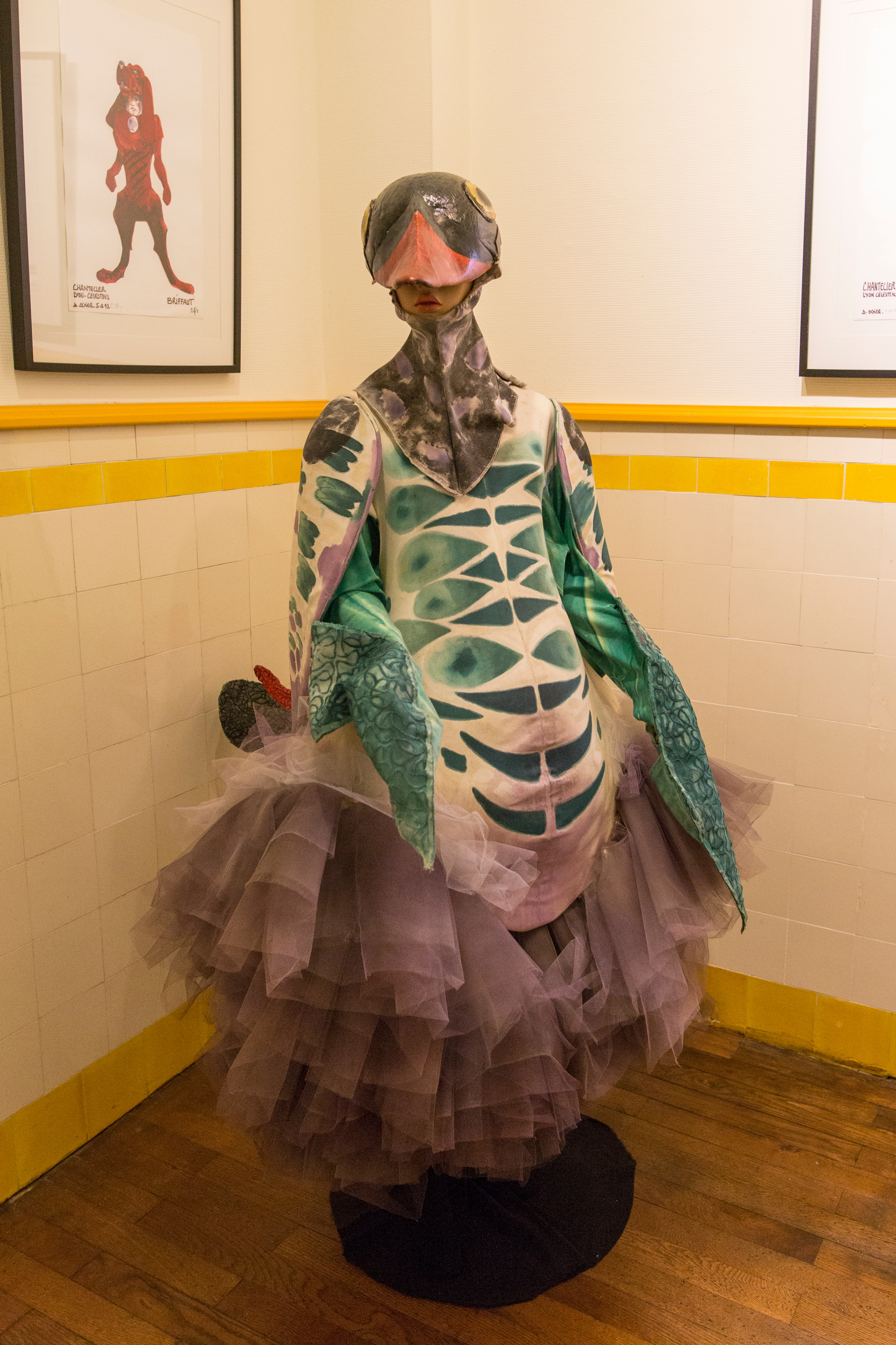 Costume pour le rôle de Chantecler